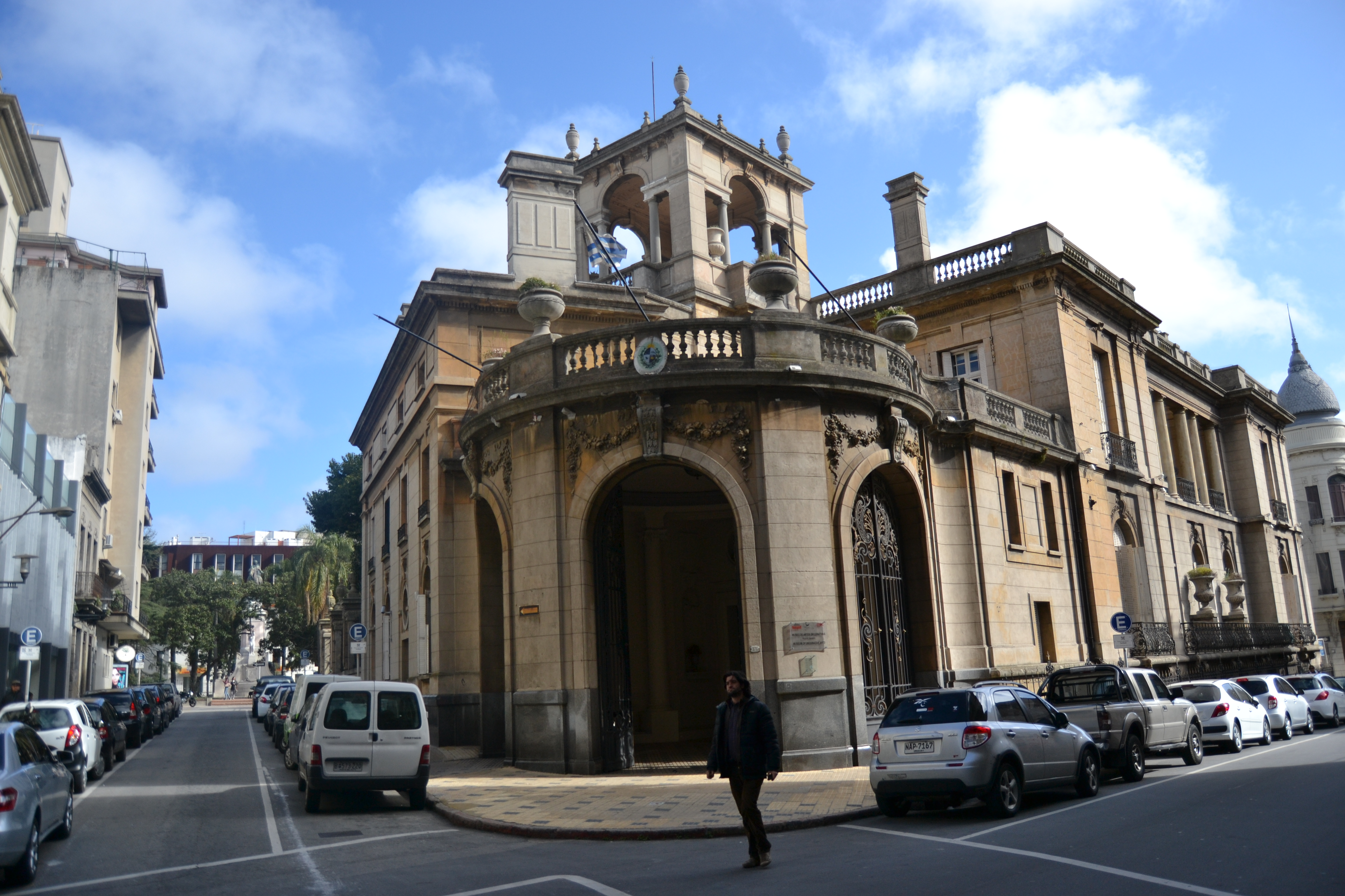 Palacio de don Félix Ortiz de Taranco. Ubicada en el departamento de Montevideo